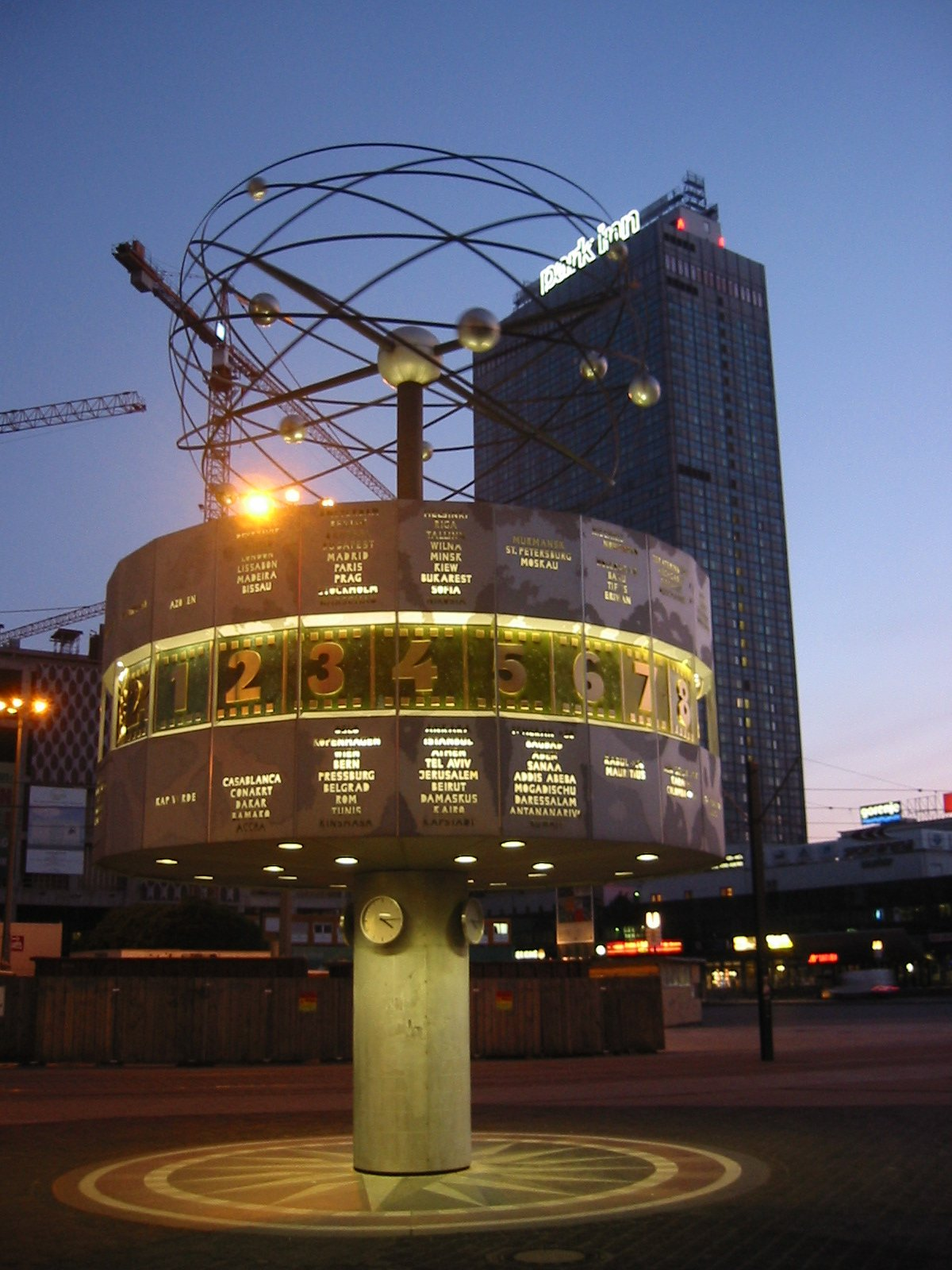 The "Weltzeituhr" located at Alexanderplatz in Berlin